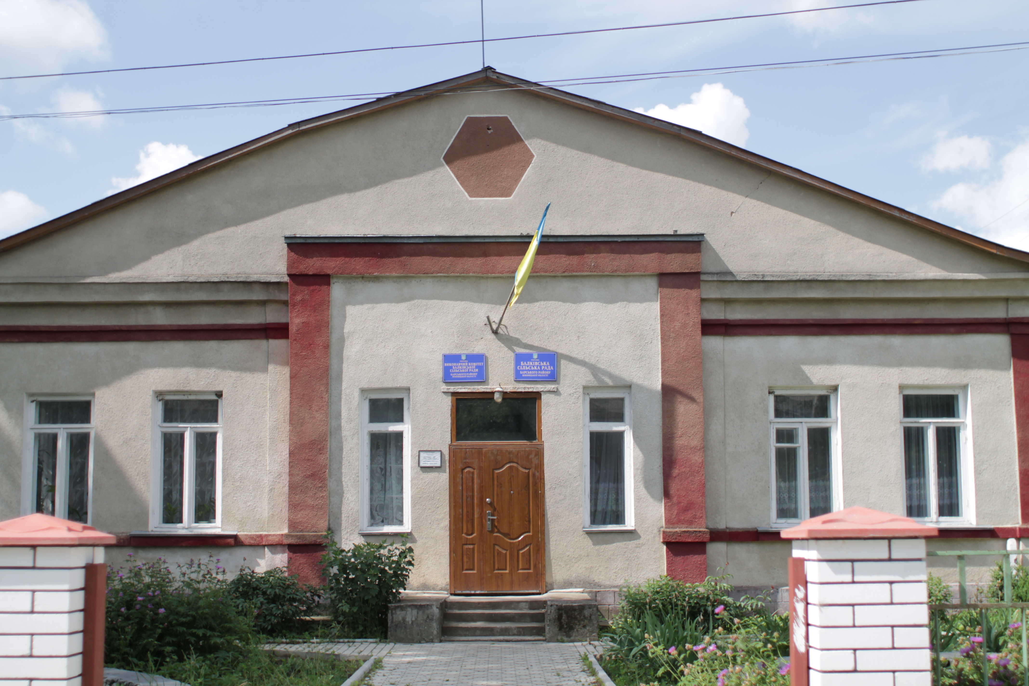 Балки, виконавчий комітет Балківської сільської ради Барського району Вінницької області, 2